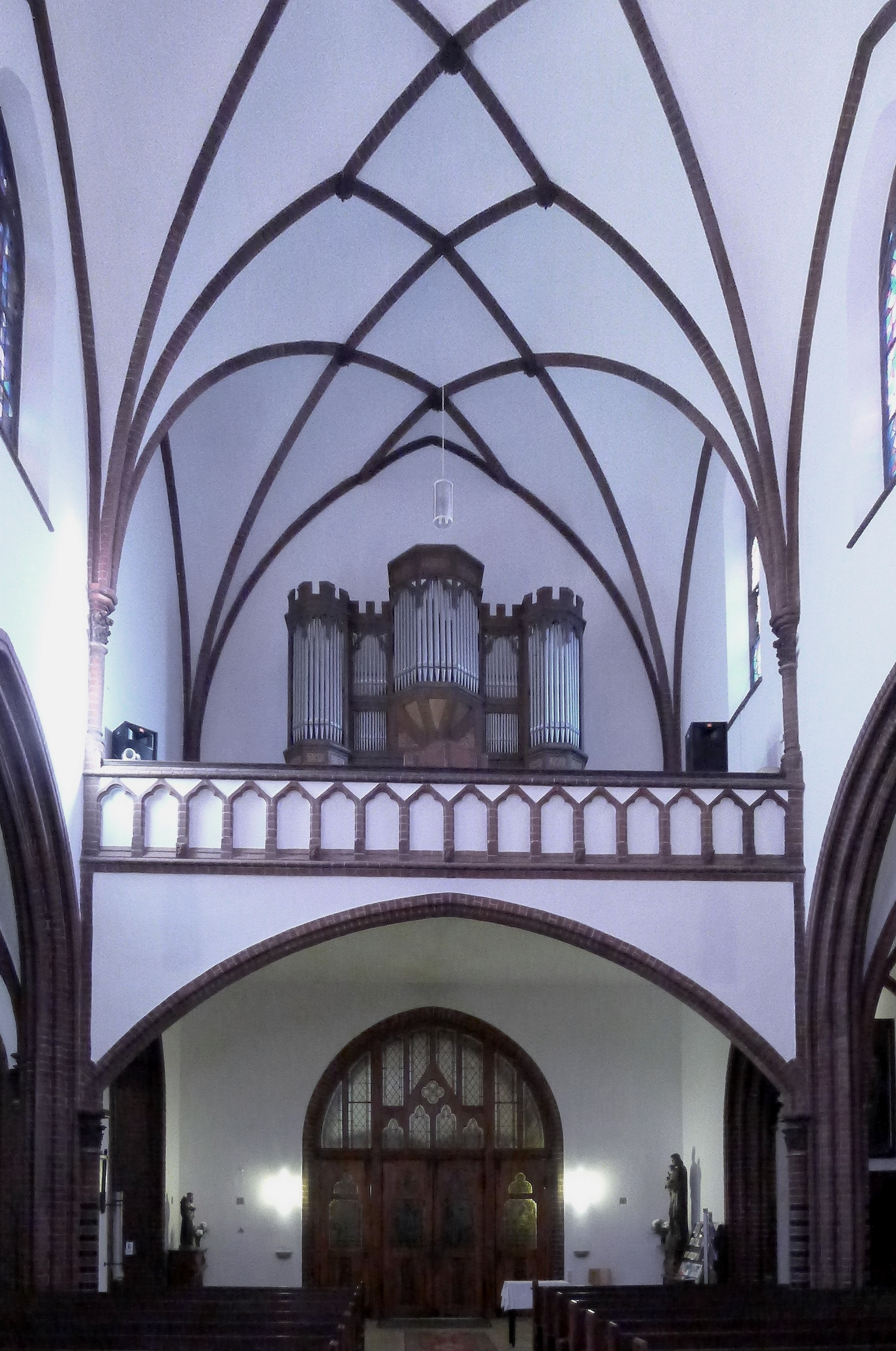 Blick auf die Eingangstür und die Orgelempore.